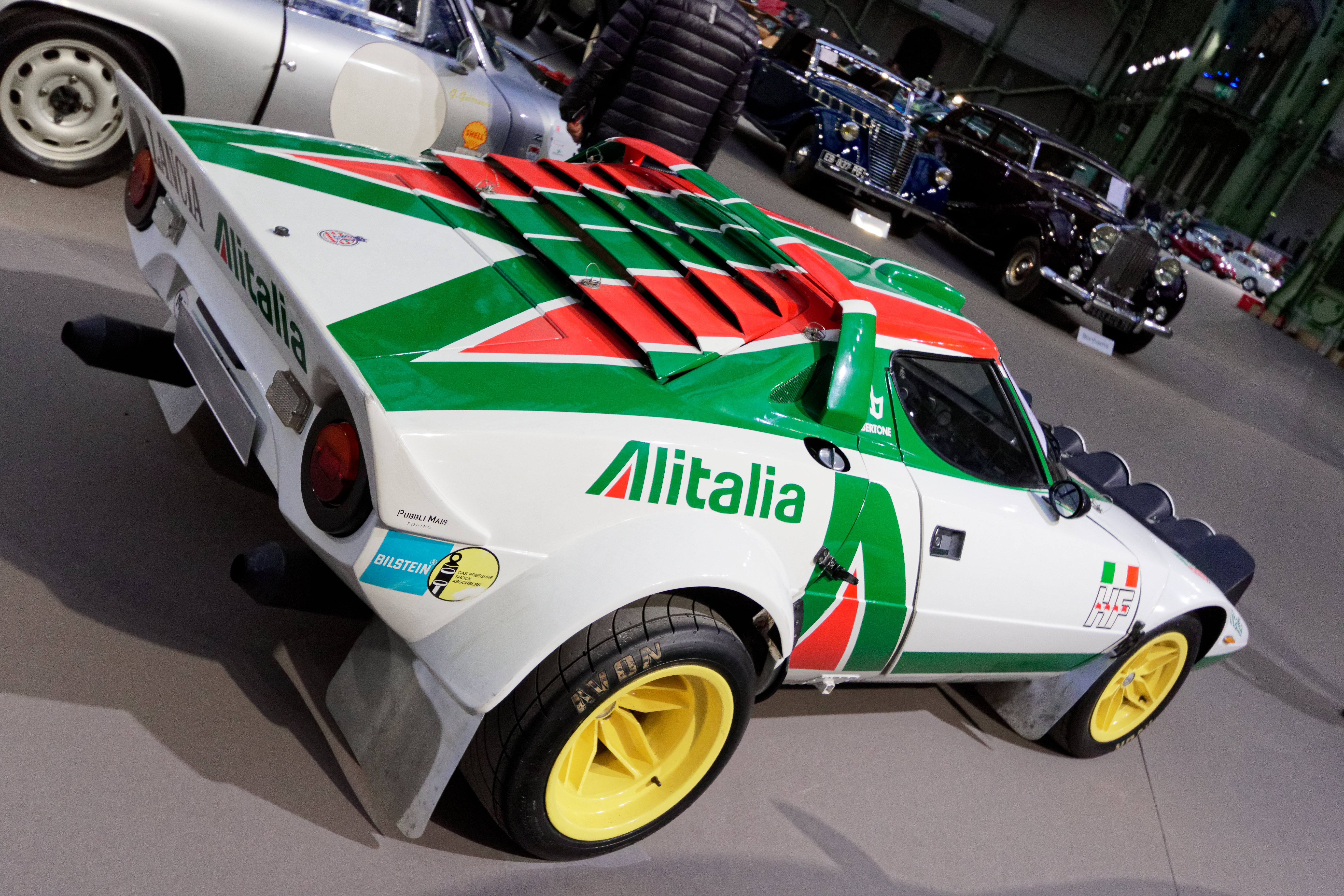 Un des véhicules présenté lors de la vente aux enchères Bonhams 2017 au Grand Palais de Paris.